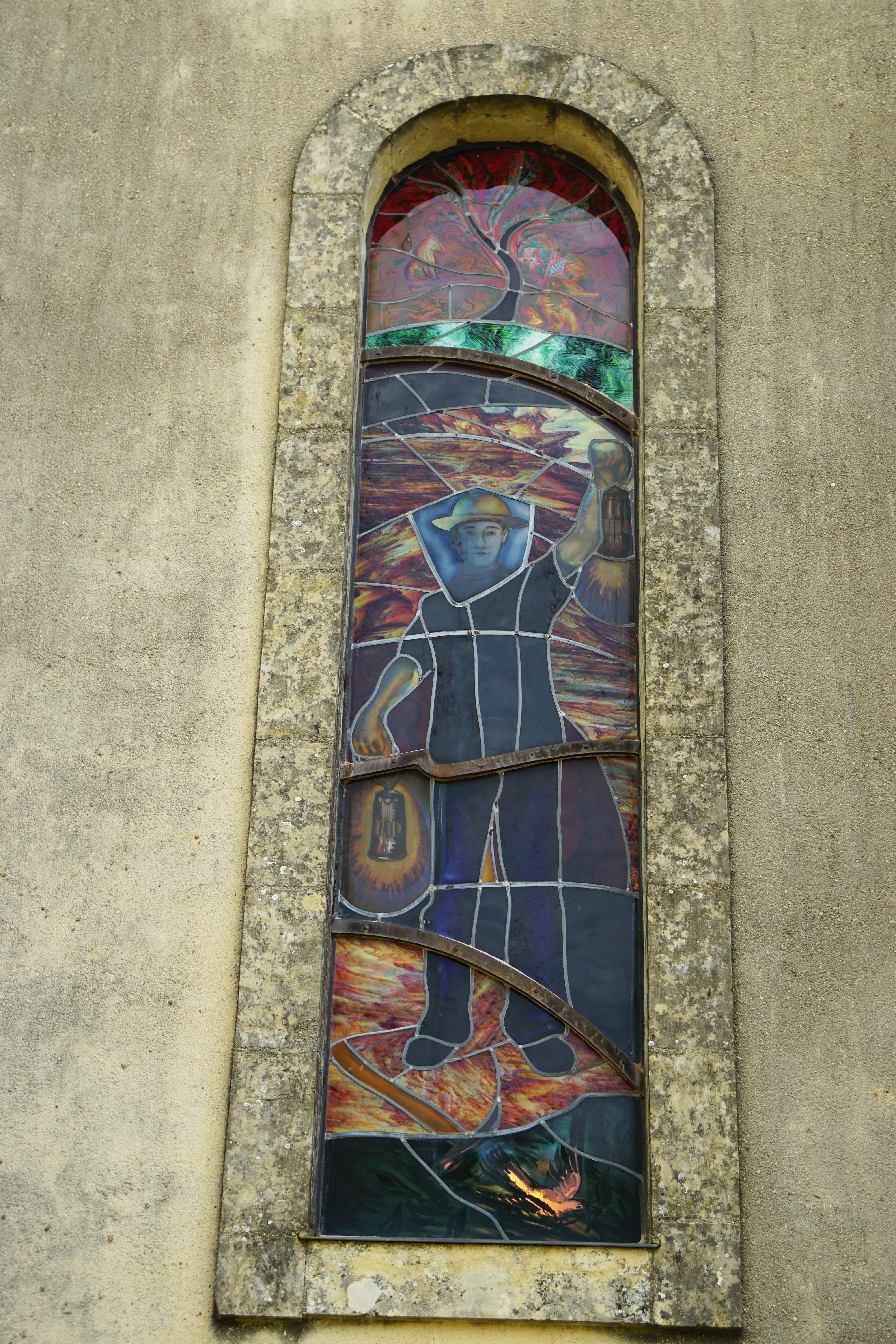 La chapelle des mineurs de Faymoreau.